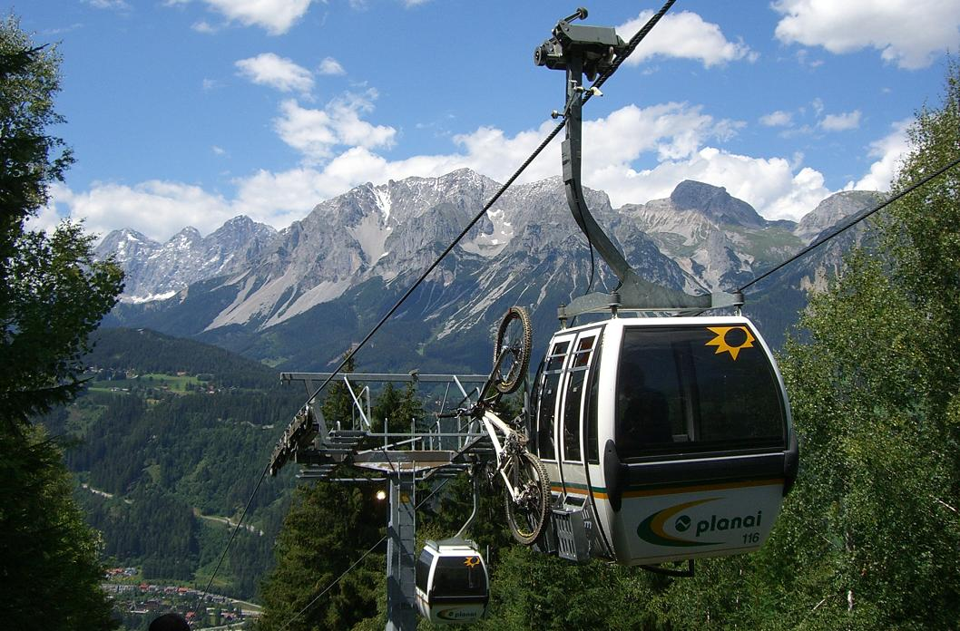 Transport eines Downhill-Mountainbikers auf der Planai. Im Hintergrund der Dachstein